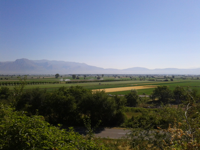 Piana del Fucino vista da Luco dei Marsi